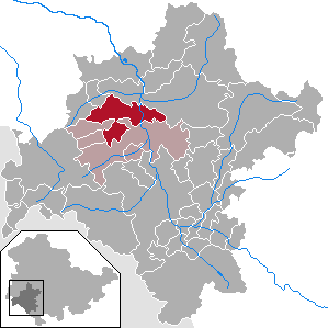 Schwallungen in Thuringia - District Schmalkalden-Meiningen